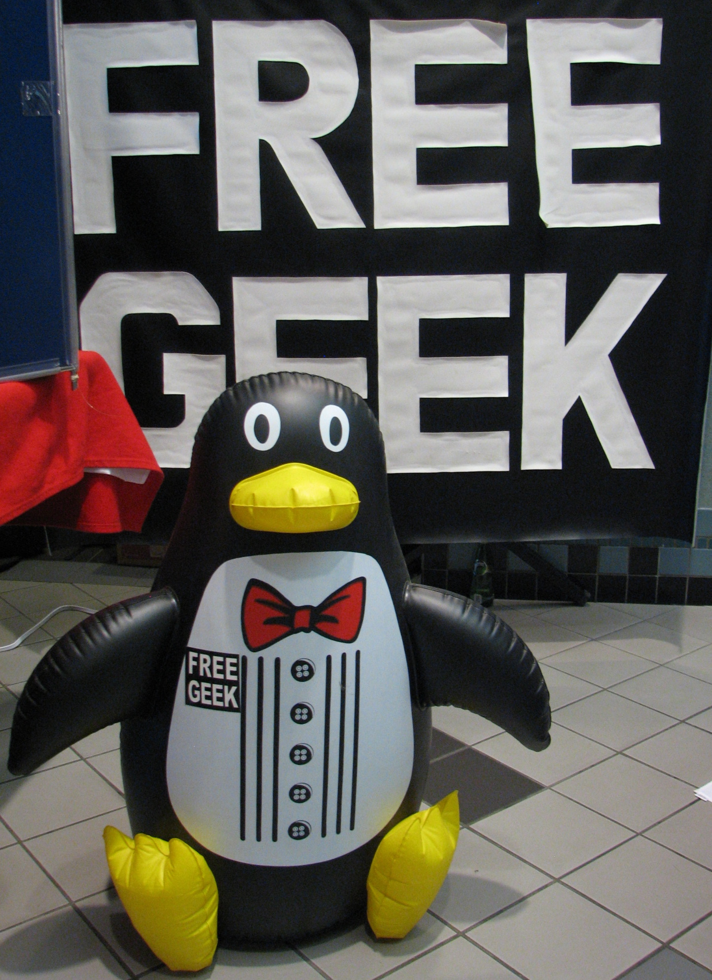 Free Geek penguin and banner.